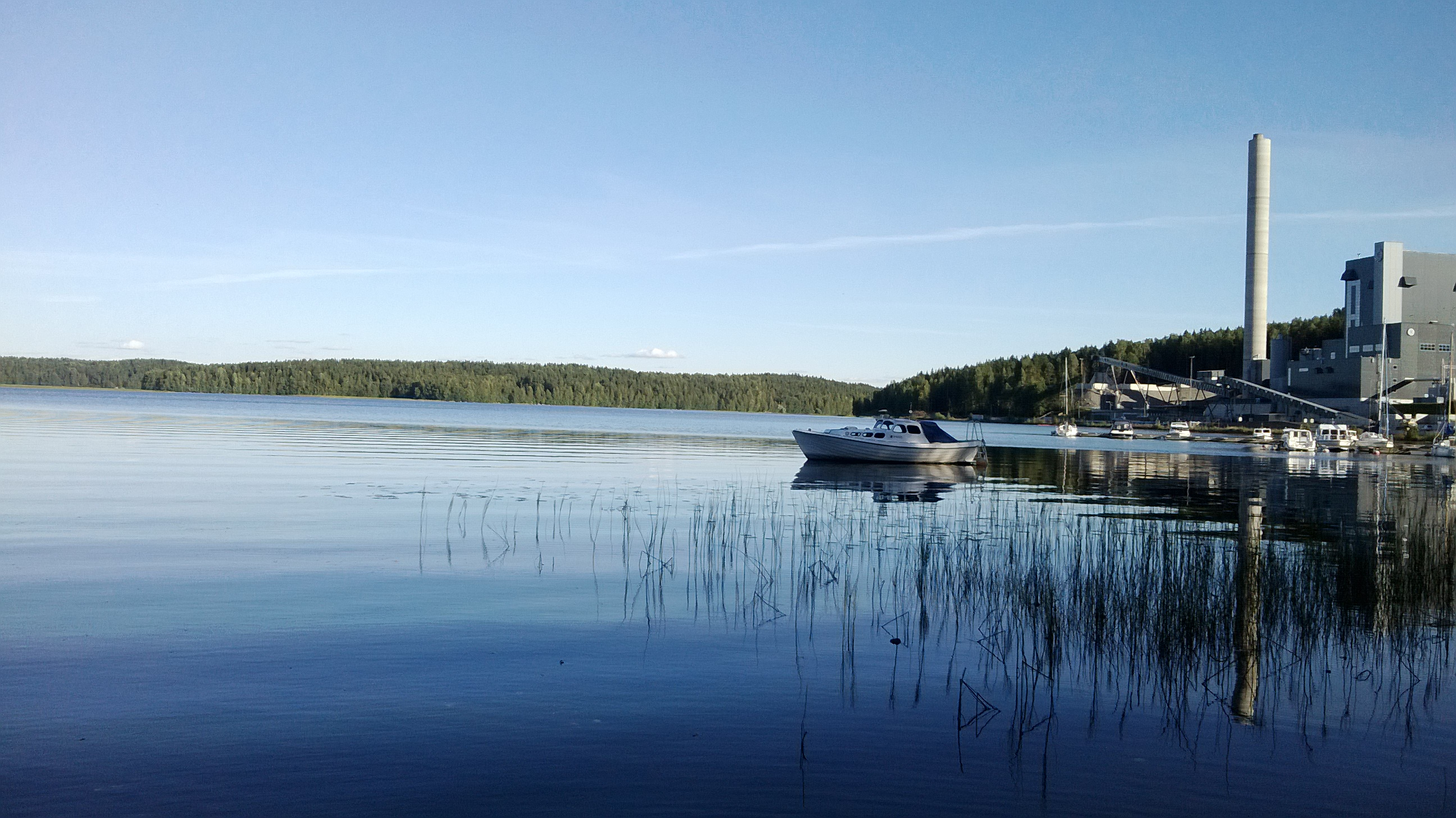 Pohjois-Päijänteen alueella oleva Iso-Urtti on niemi, joka on kapean kannaksen kautta kiinni Keljonkankaan mantereessa (Urtinpohja). Oikealla Keljonlahden voimalaitos.